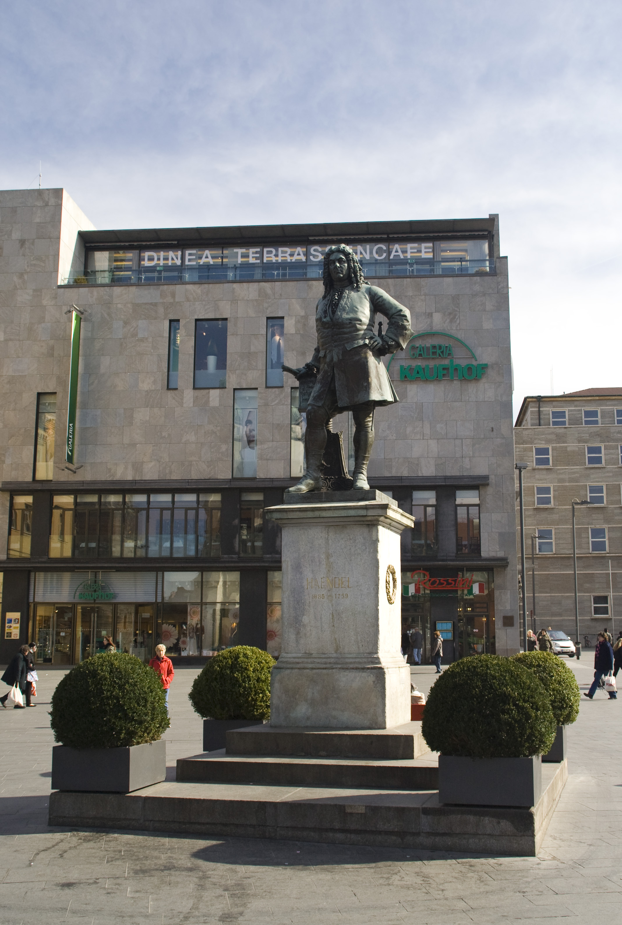 Das Händel-Denkmal auf dem Marktplatz in Halle/Saale